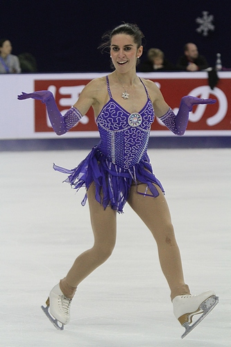 Валентина Маркеи на Кубке Китая 2011